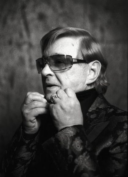 Роман Виктюк. Алексей Никишин.2008